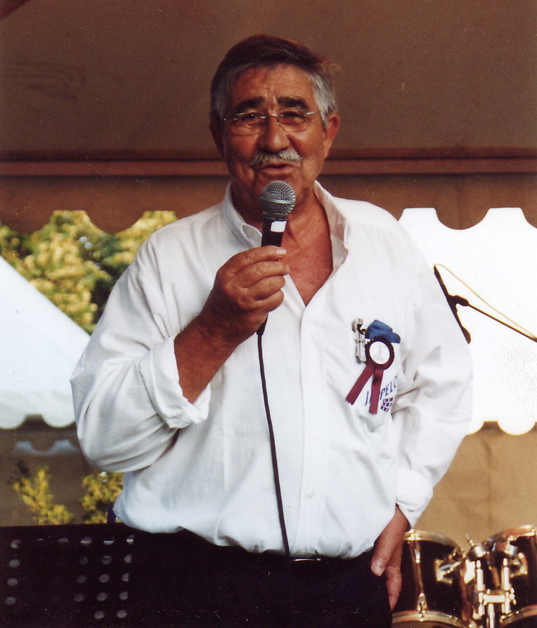 Henry delage au jumping de blaye